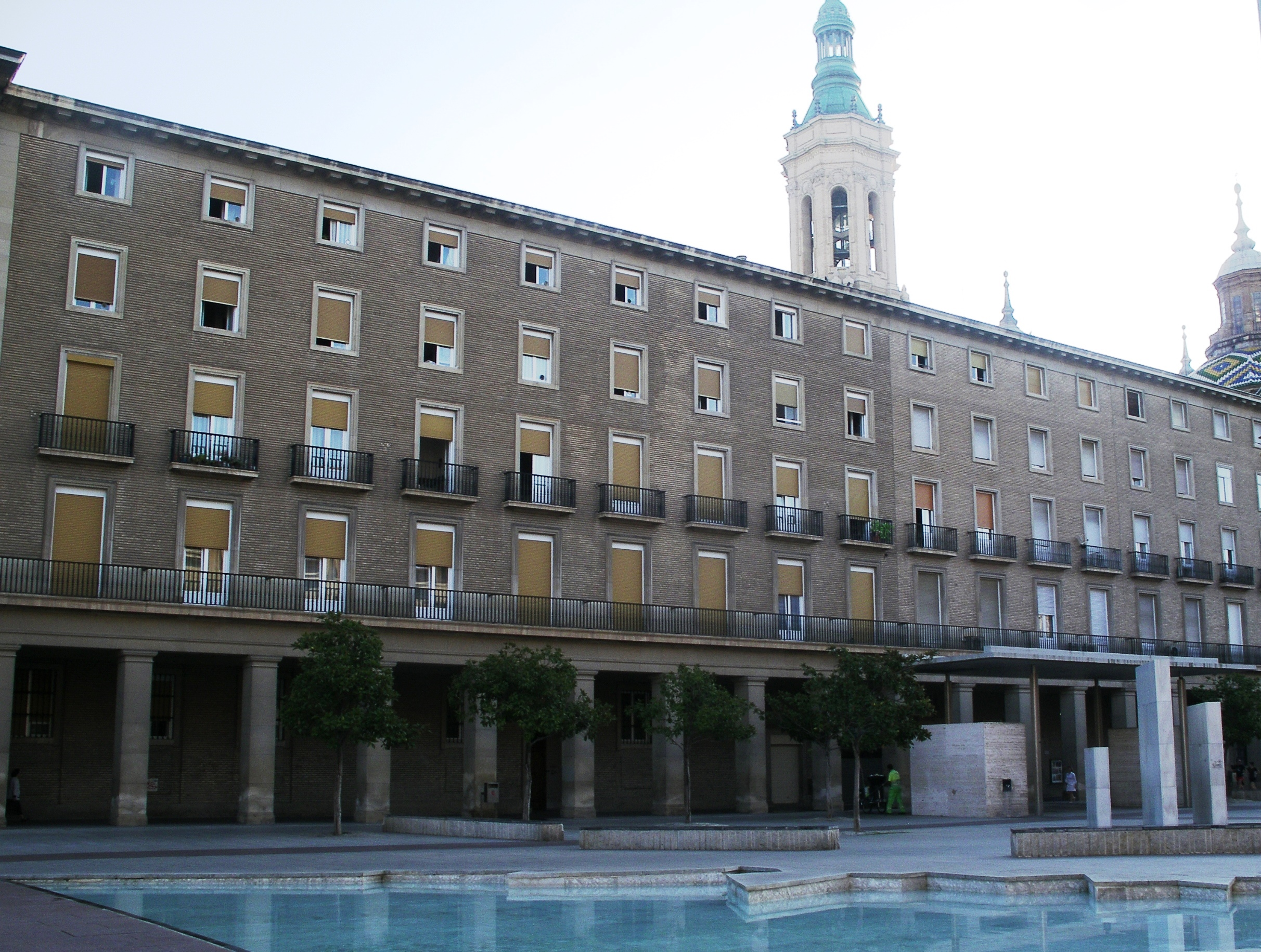 Residència de N. Sra. del Pilar, a la Plaça del Pilar de Saragossa, casa general de les Germanes del Sagrat Cor de Jesús i dels Àngels